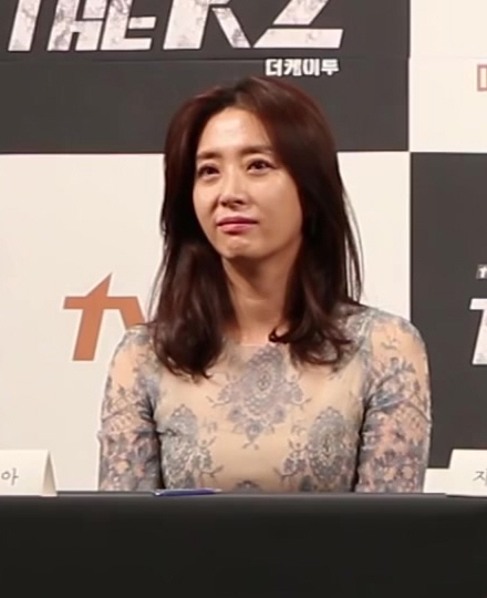 (TV10) 지창욱의 마지막 드리마 더케이투 제작발표회 현장